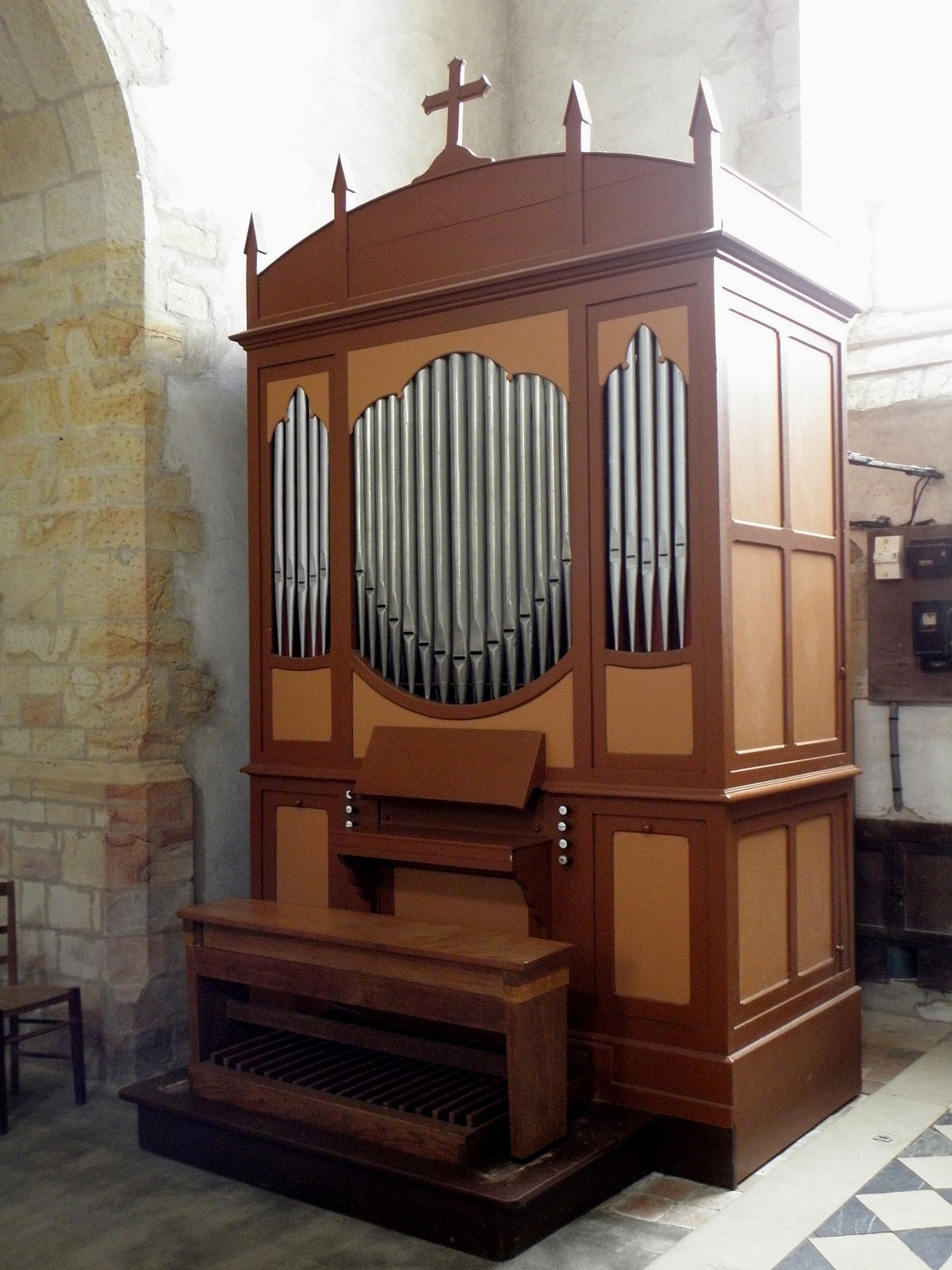 Orgue de l'église Saint-Martin-de-Tours d'Amanlis (35).